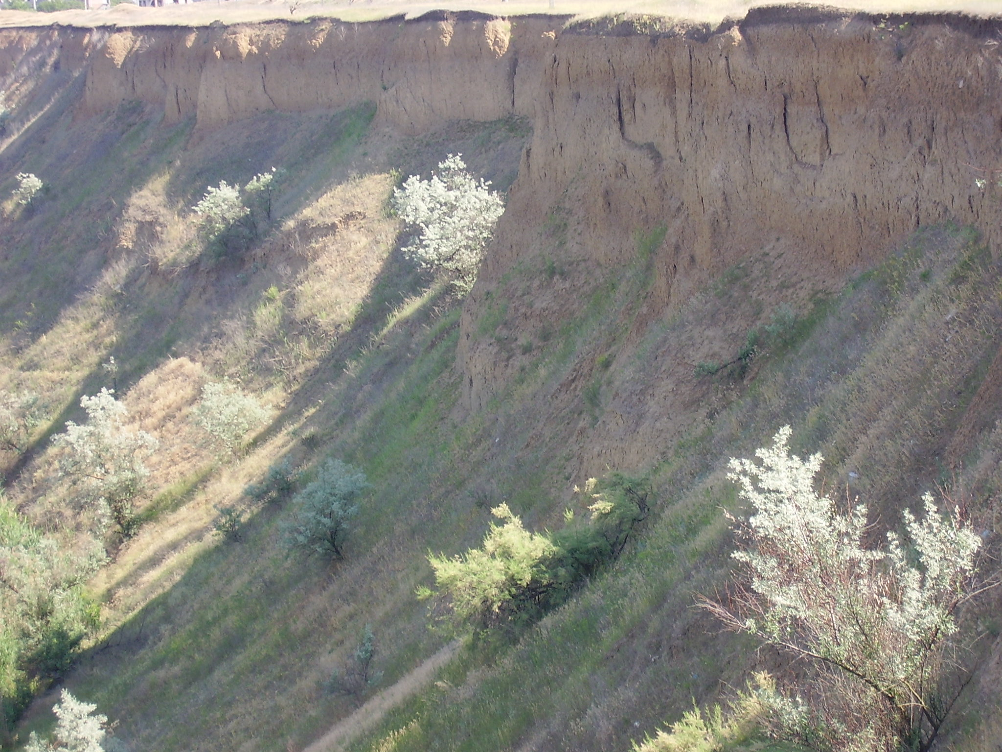 Колкотова балка, монумент природы, находится в Муниципий Тирасполь, Северная окраина мун. Тирасполь (код MD-TS-mn.A-087) A-087